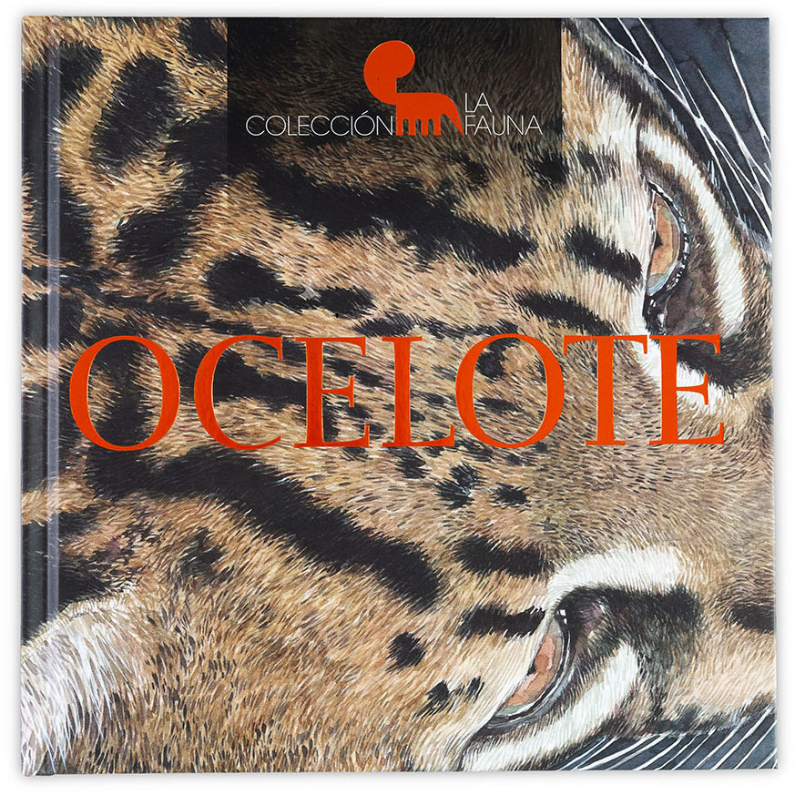 Portada del libro sobre el Ocelote, de la Colección La Fauna (2019)